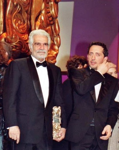 Omar Sharif et Gad Elmaleh à la cérémonie des Césars.